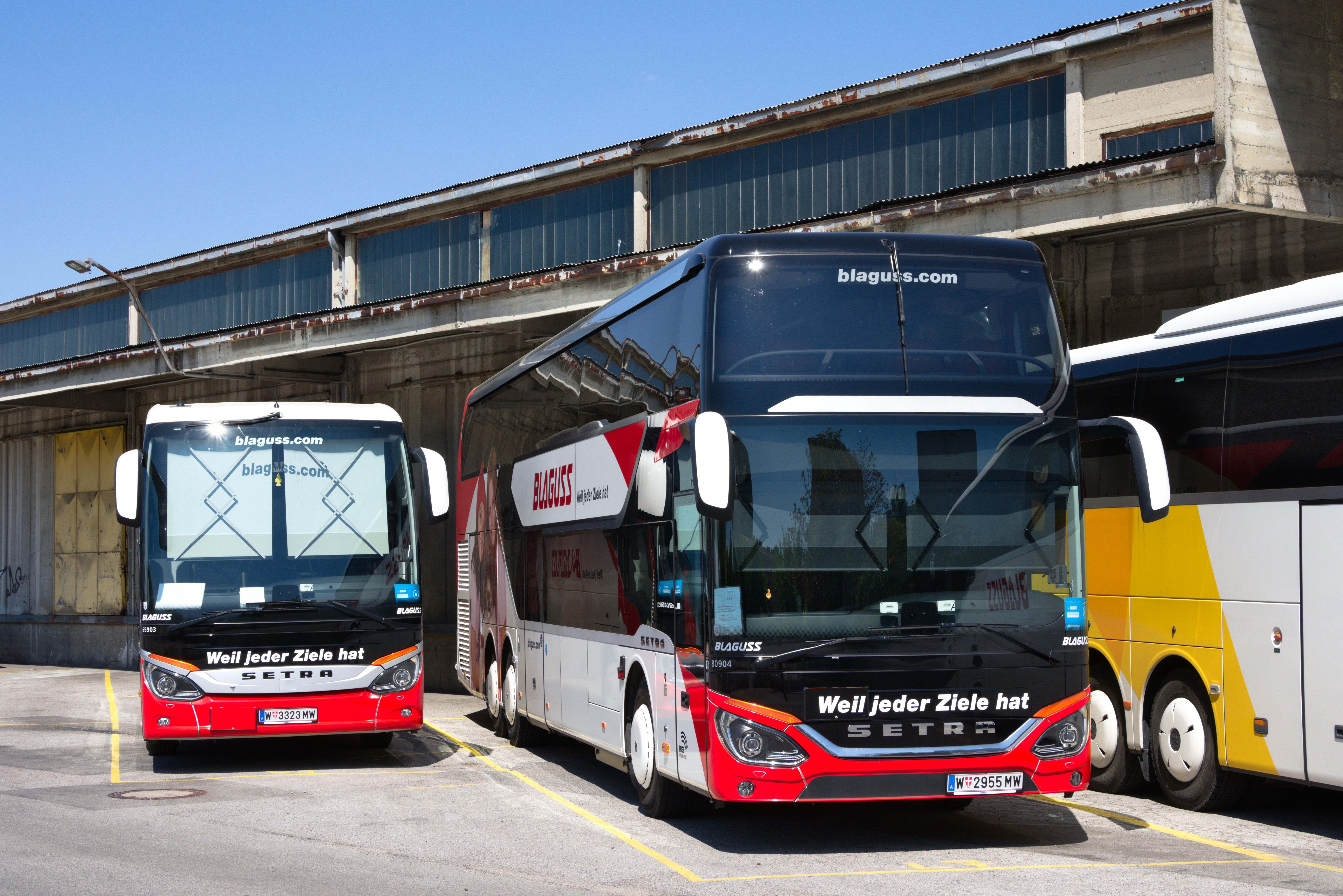 Ein Setra S 531 DT des Unternehmens Blaguss am Gelände des Wiener Nordwestbahnhofes.